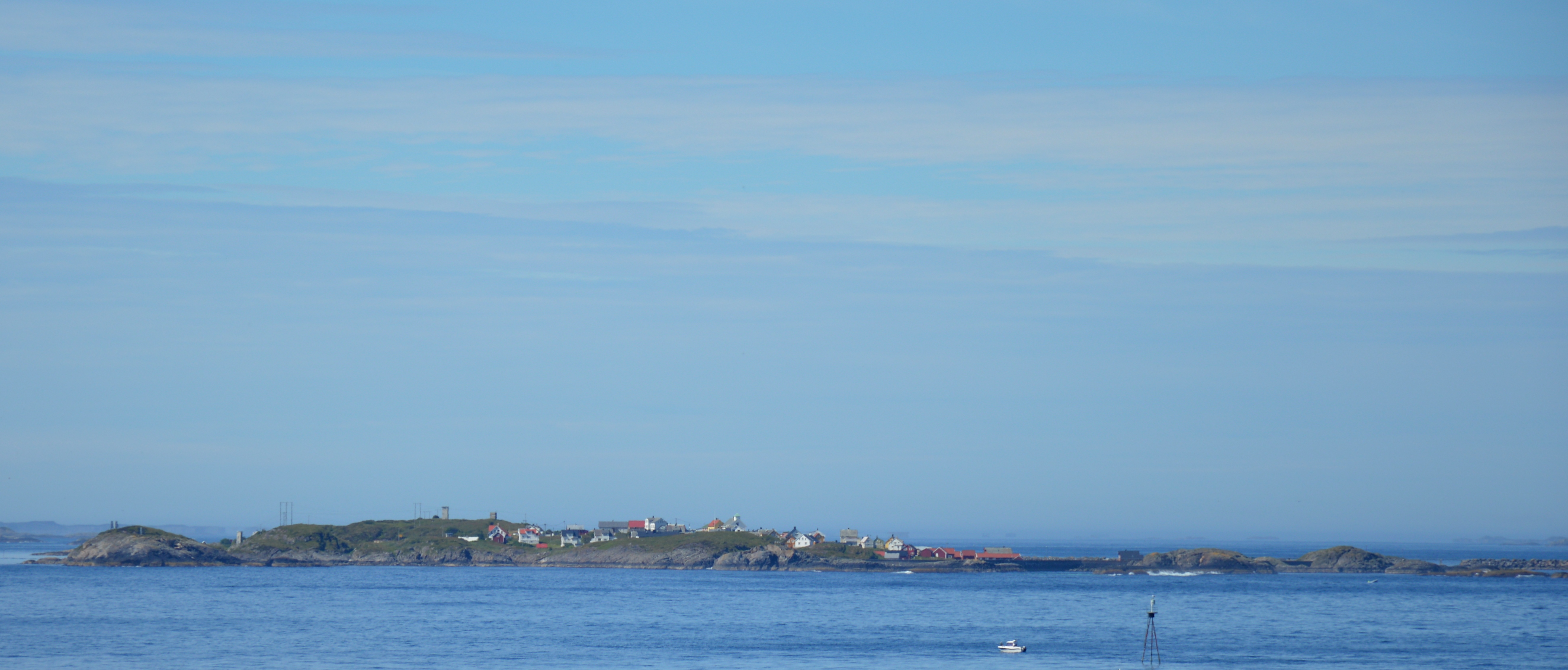 Bjornsund